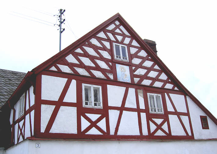 Fachwerkhaus in Egerteich Fotograf: Walter J. Pilsak, Waldsassen Copyright Status: GNU Freie Dokumentationslizenz